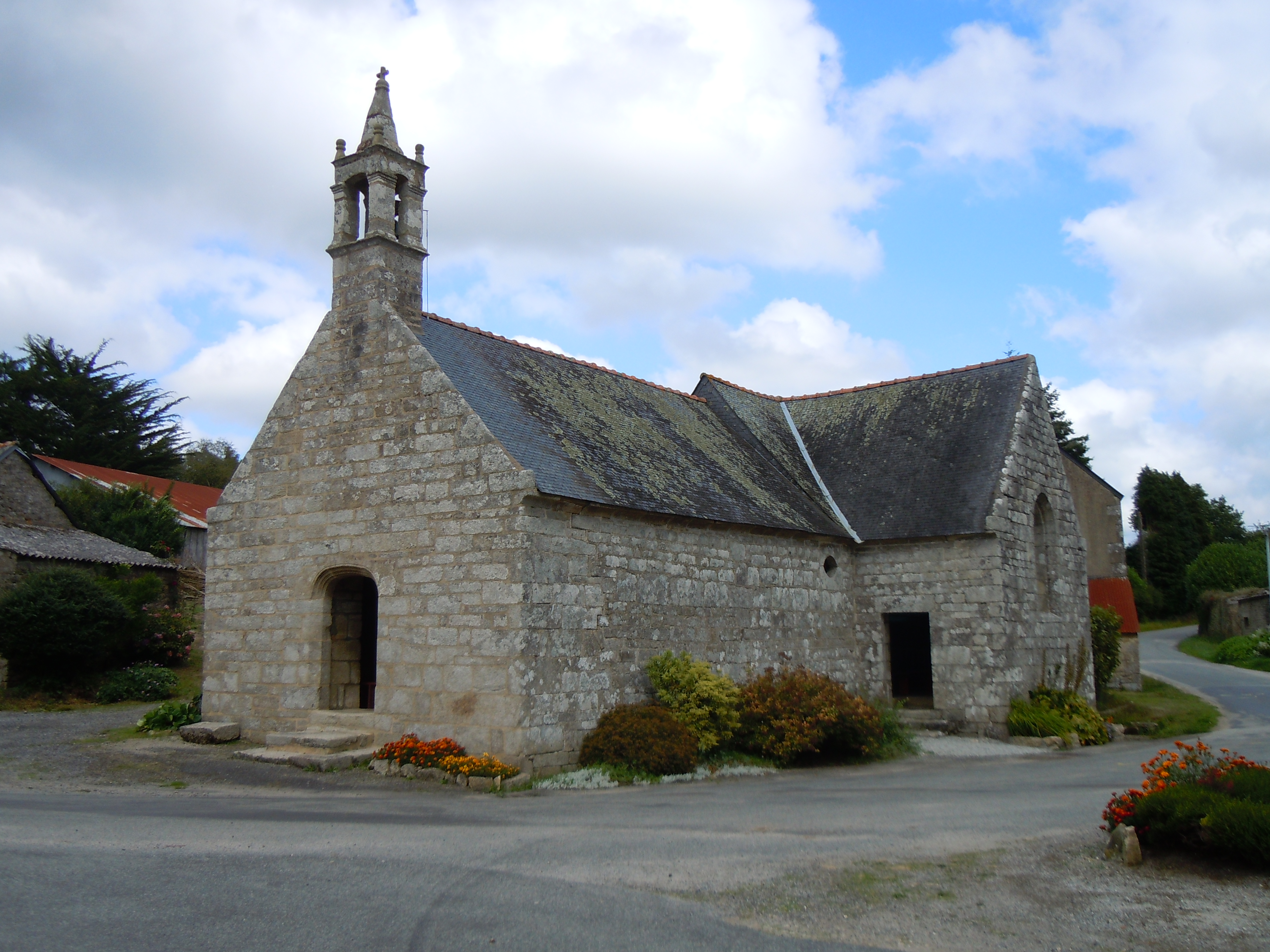 chapelle Sainte-Catherine de Meslan, département du Morbihan, France